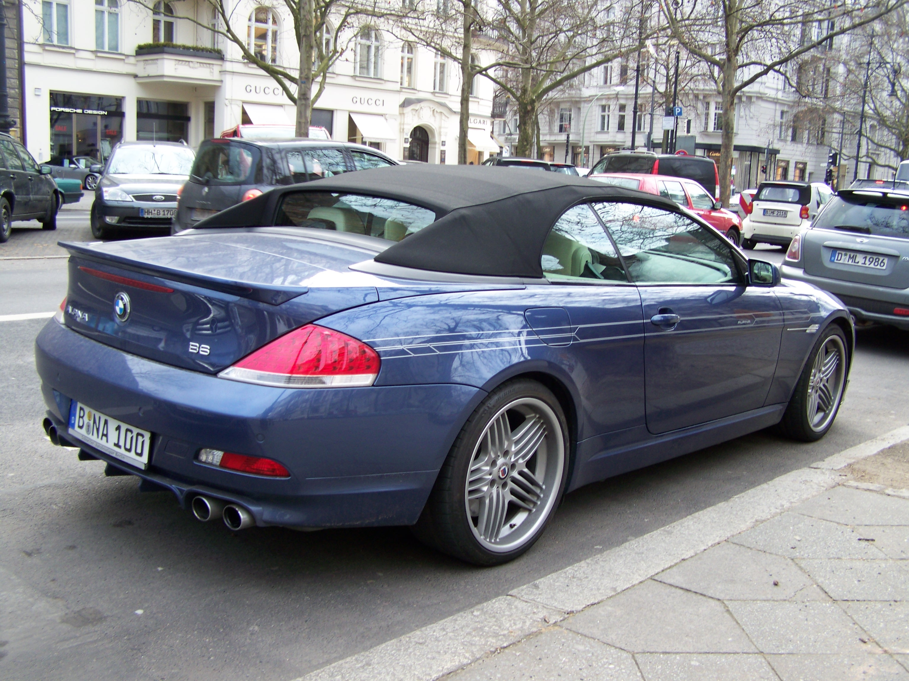 Alpina B6 Cabrio